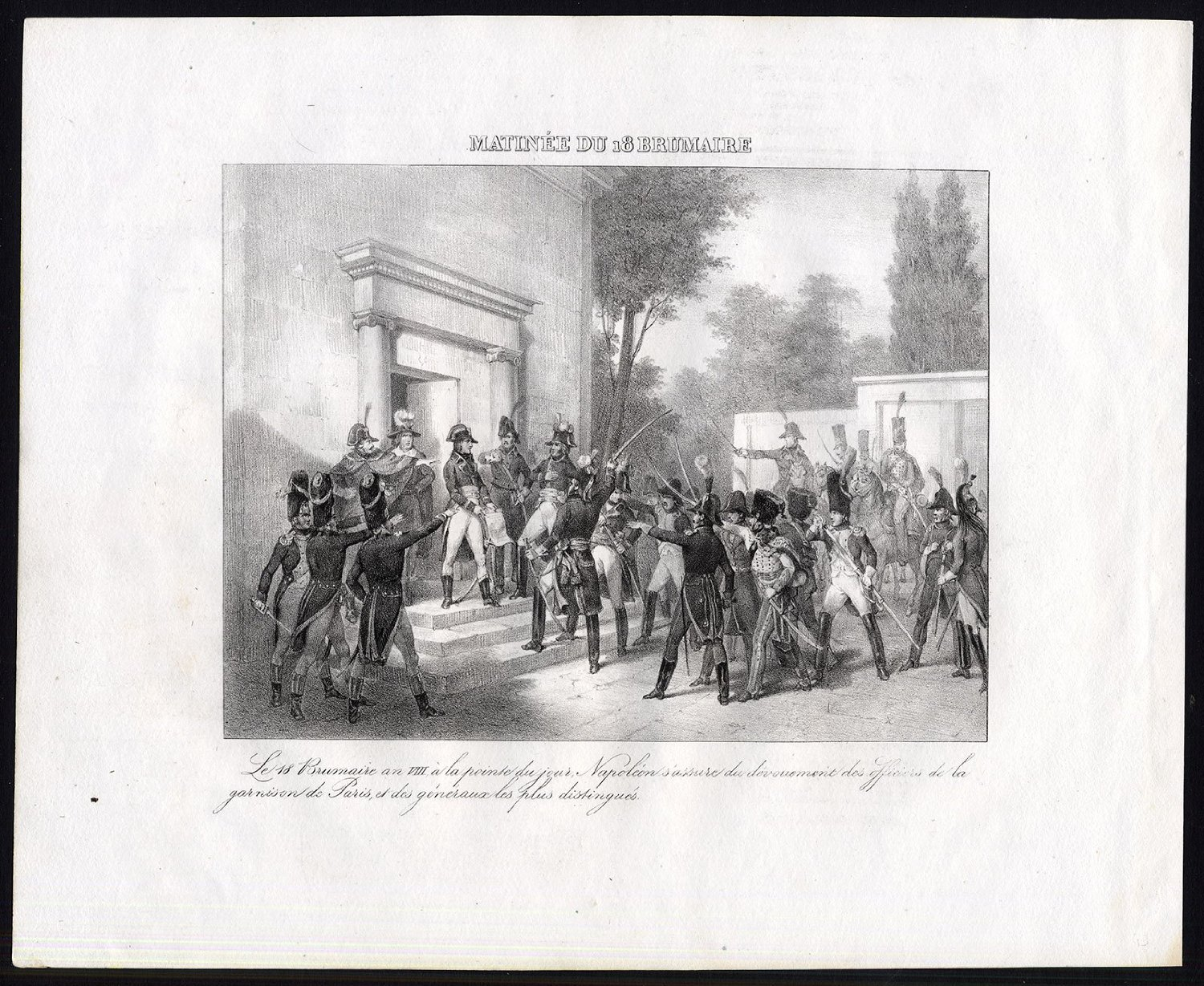 Встреча Наполеона с генералами утром 18 брюмера